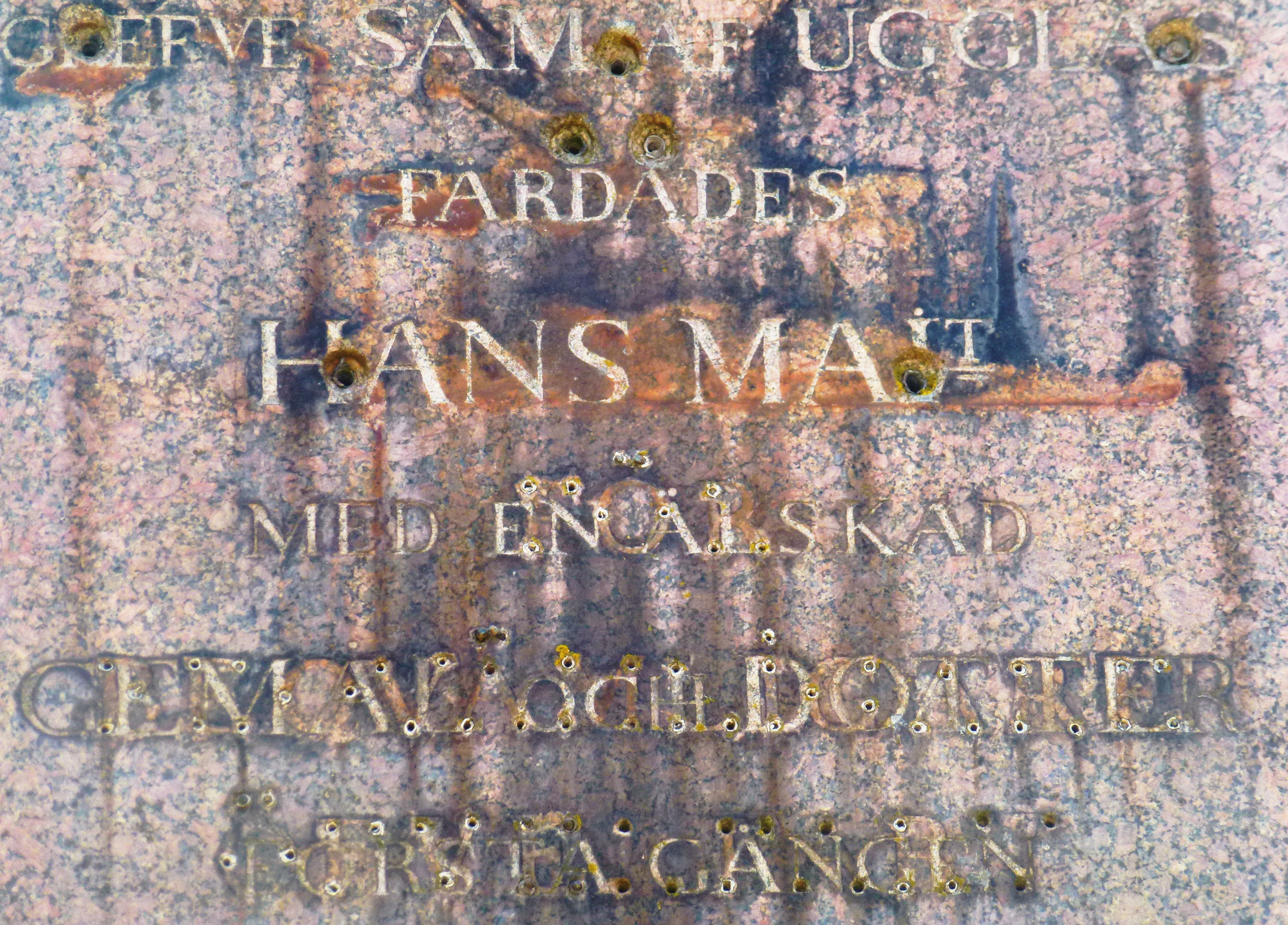 Stäket gamla vägbron obelisk textfragment